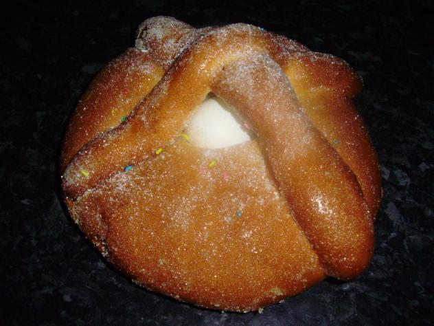 Fotografía de un hornazo de Puertollano de tamaño estándar, con un solo huevo.